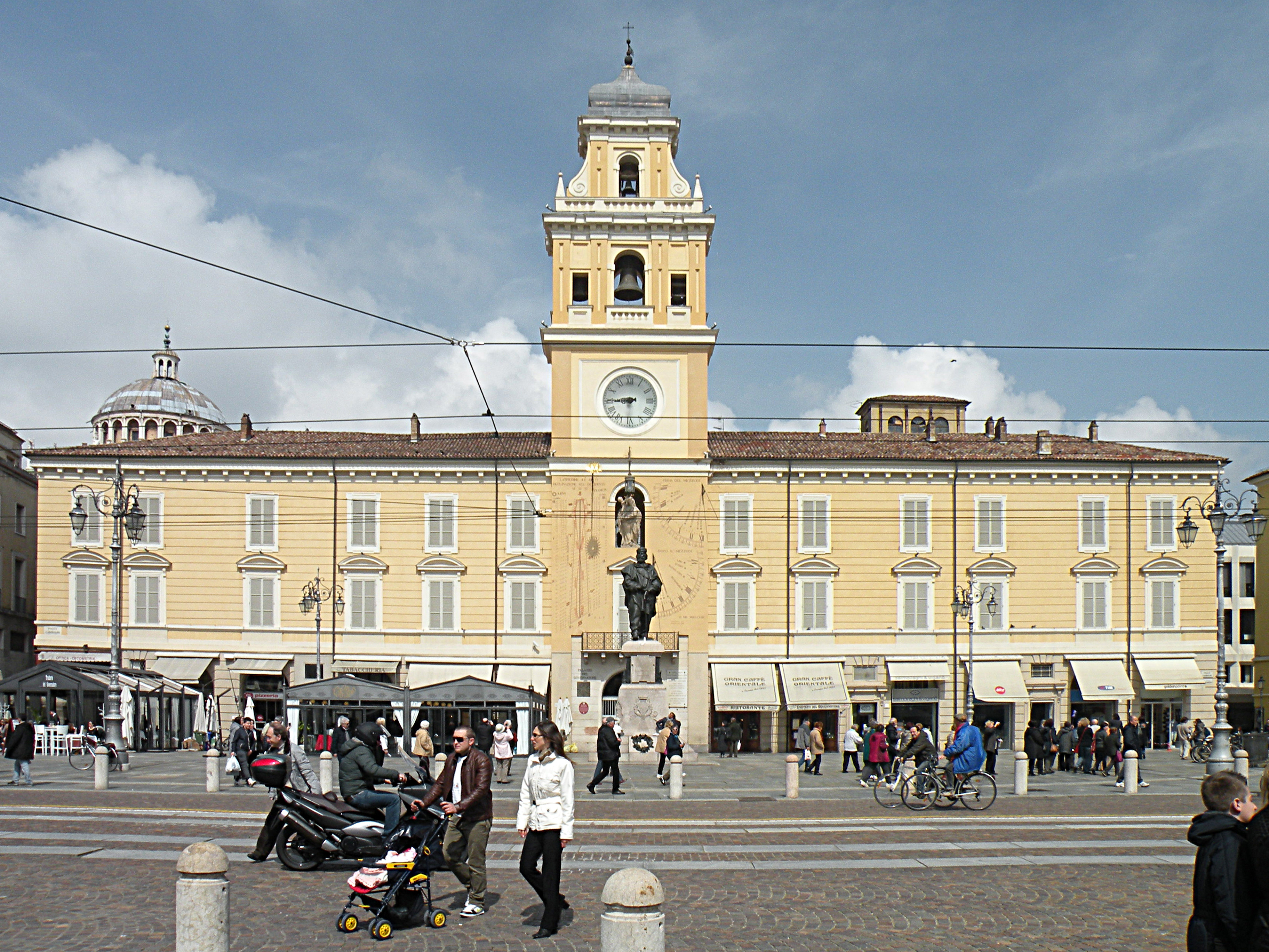 Префектура Пармы